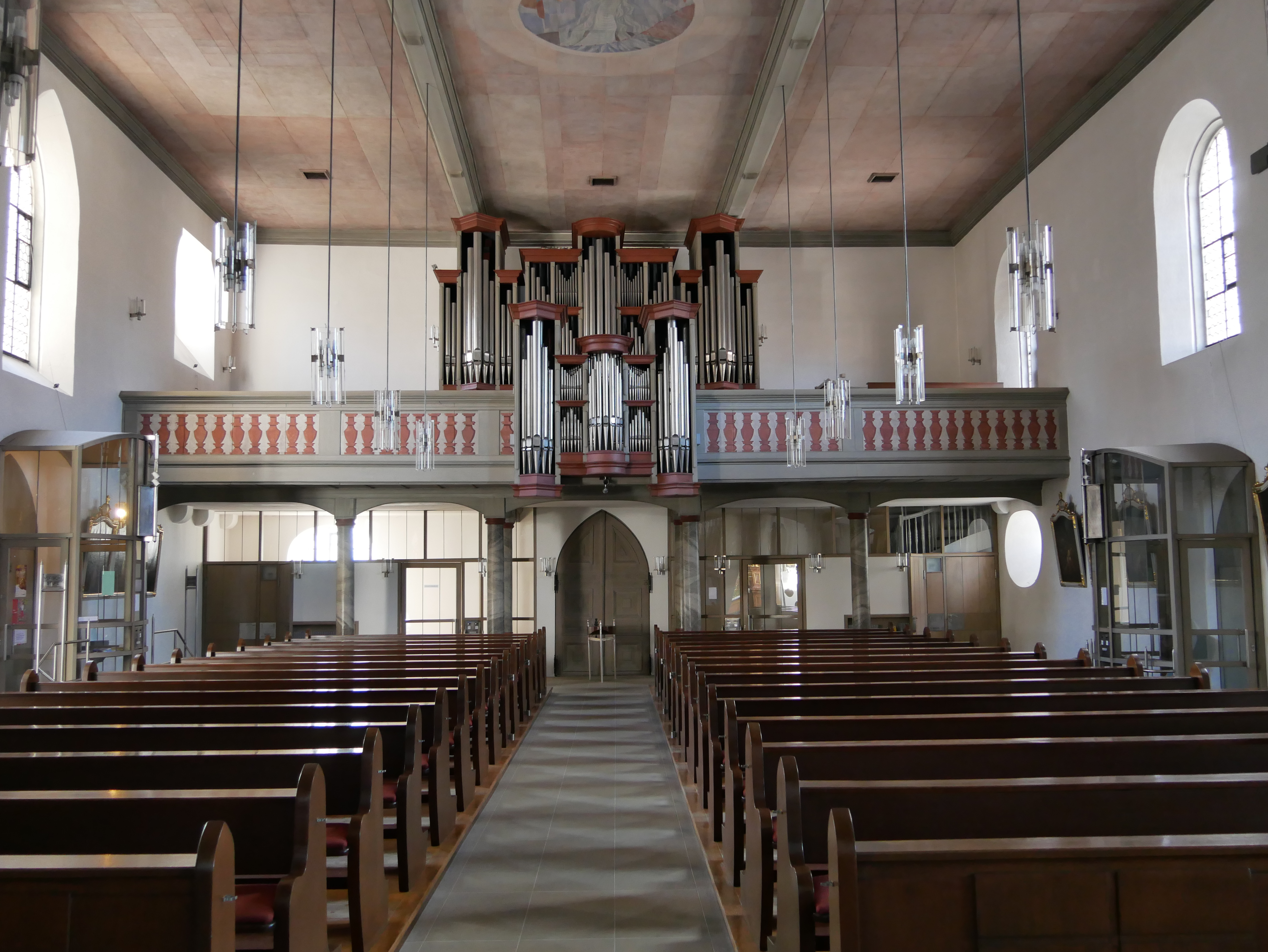 Lichtenfels, Kirchplatz, Kath. Stadtkirche: Blick zu Empore und Orgelprospekt